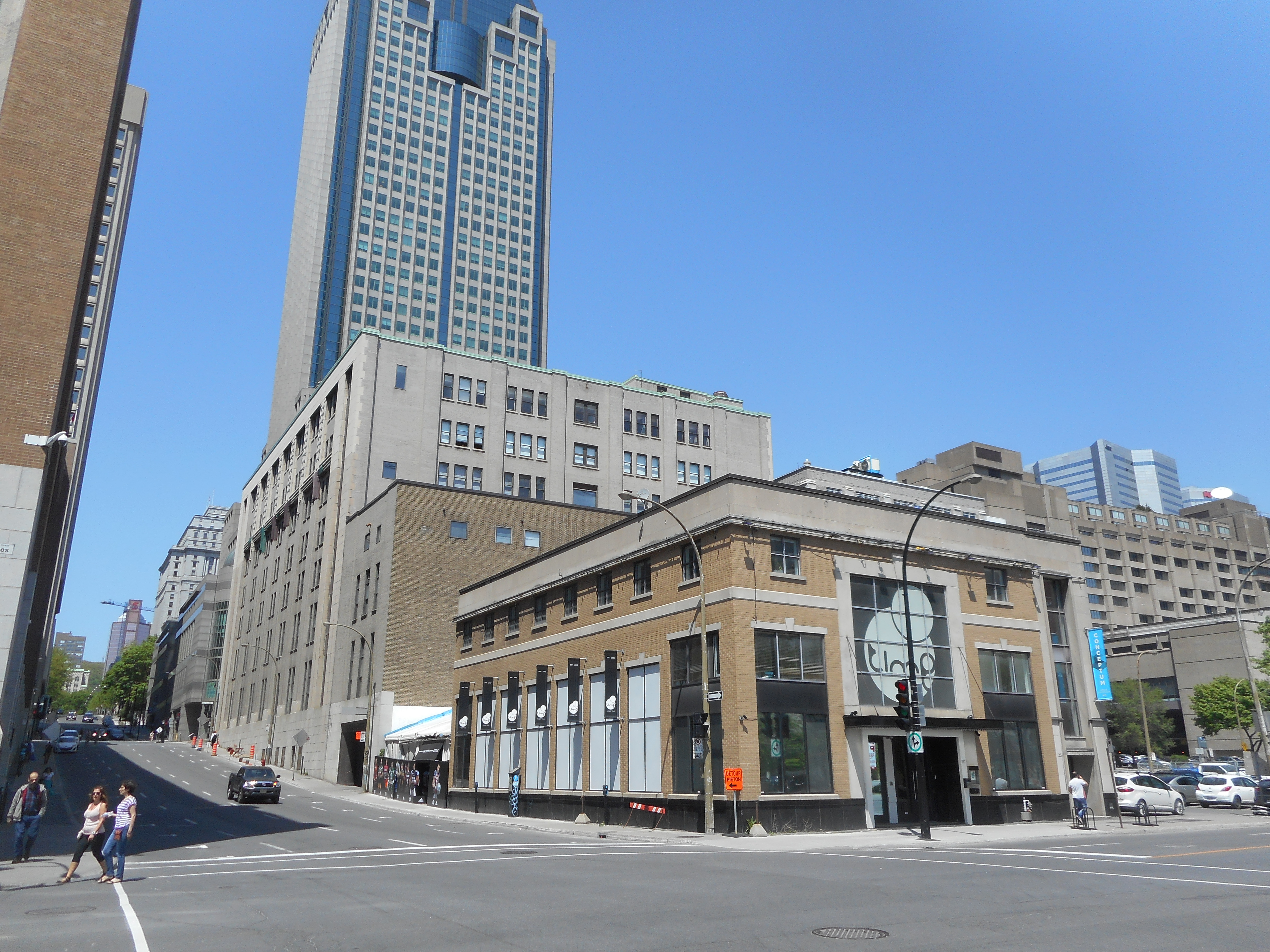 Time Supper Club, 997, rue Saint-Jacques, Montréal